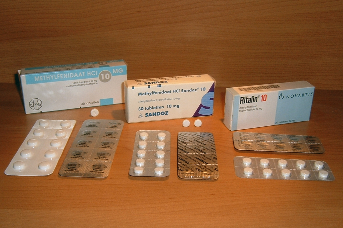 In Nederland op dit moment verkrijgbare tabletten Methylfenidaat (10 mg)